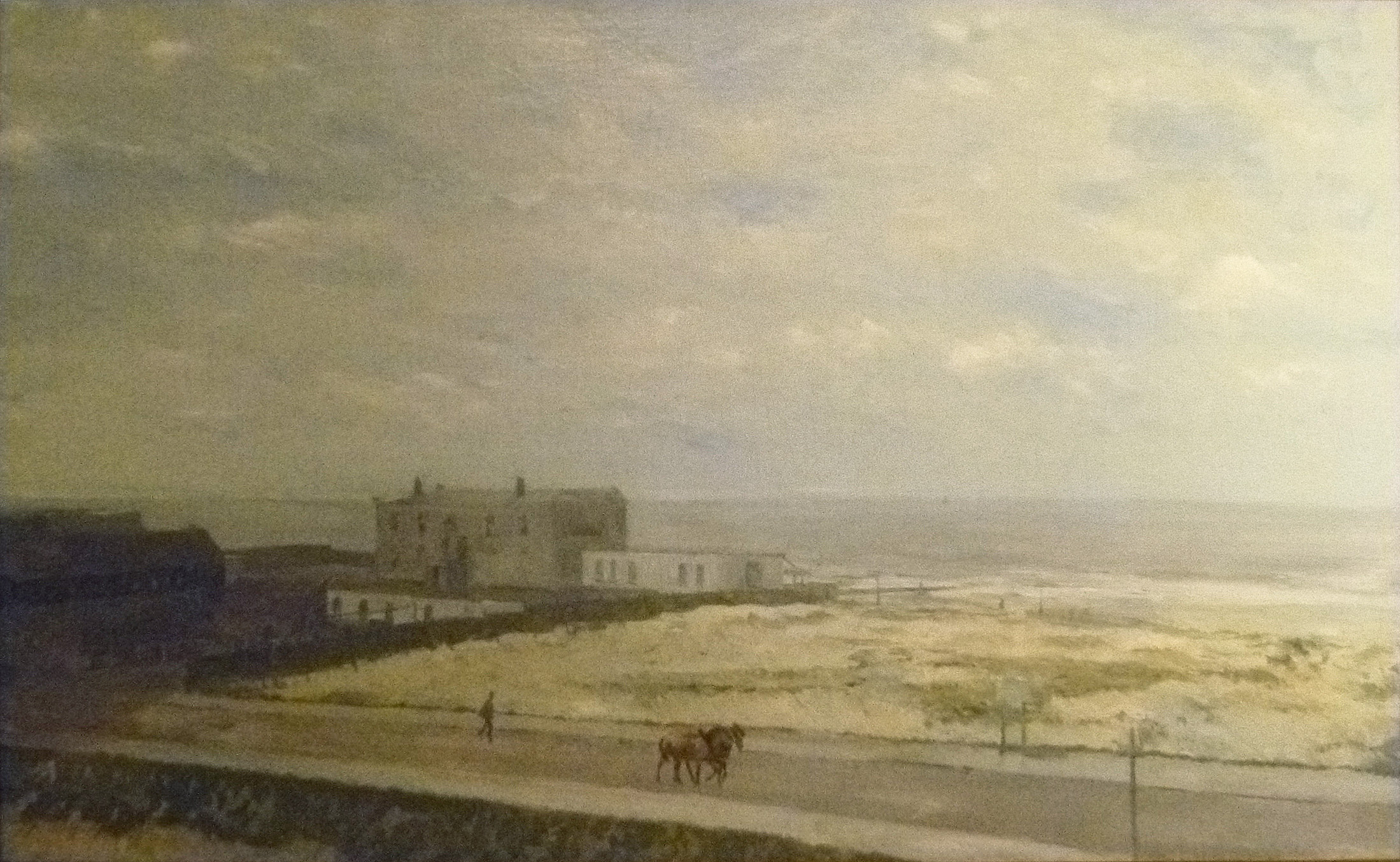 "Duinen en oesterputten nabij Oostende" (ca. 1880); olieverf op doek door de Belgische kunstschilder Jean-Baptiste Degreef; collectie stad Oostende in MuZee